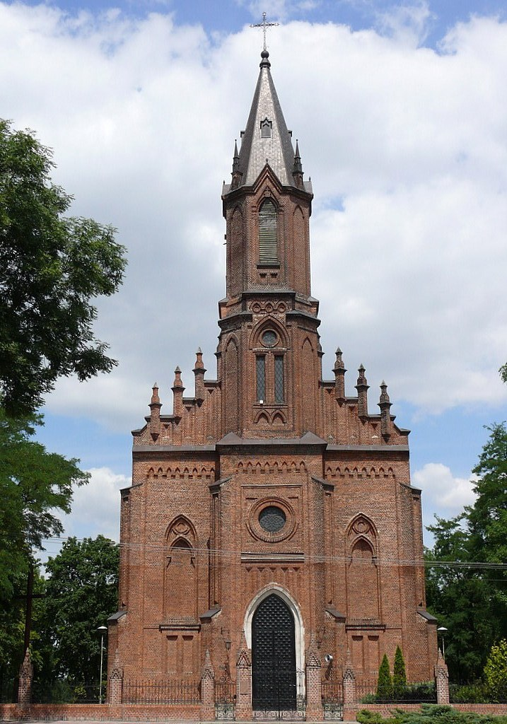 Kościół parafialny w Krzymowie